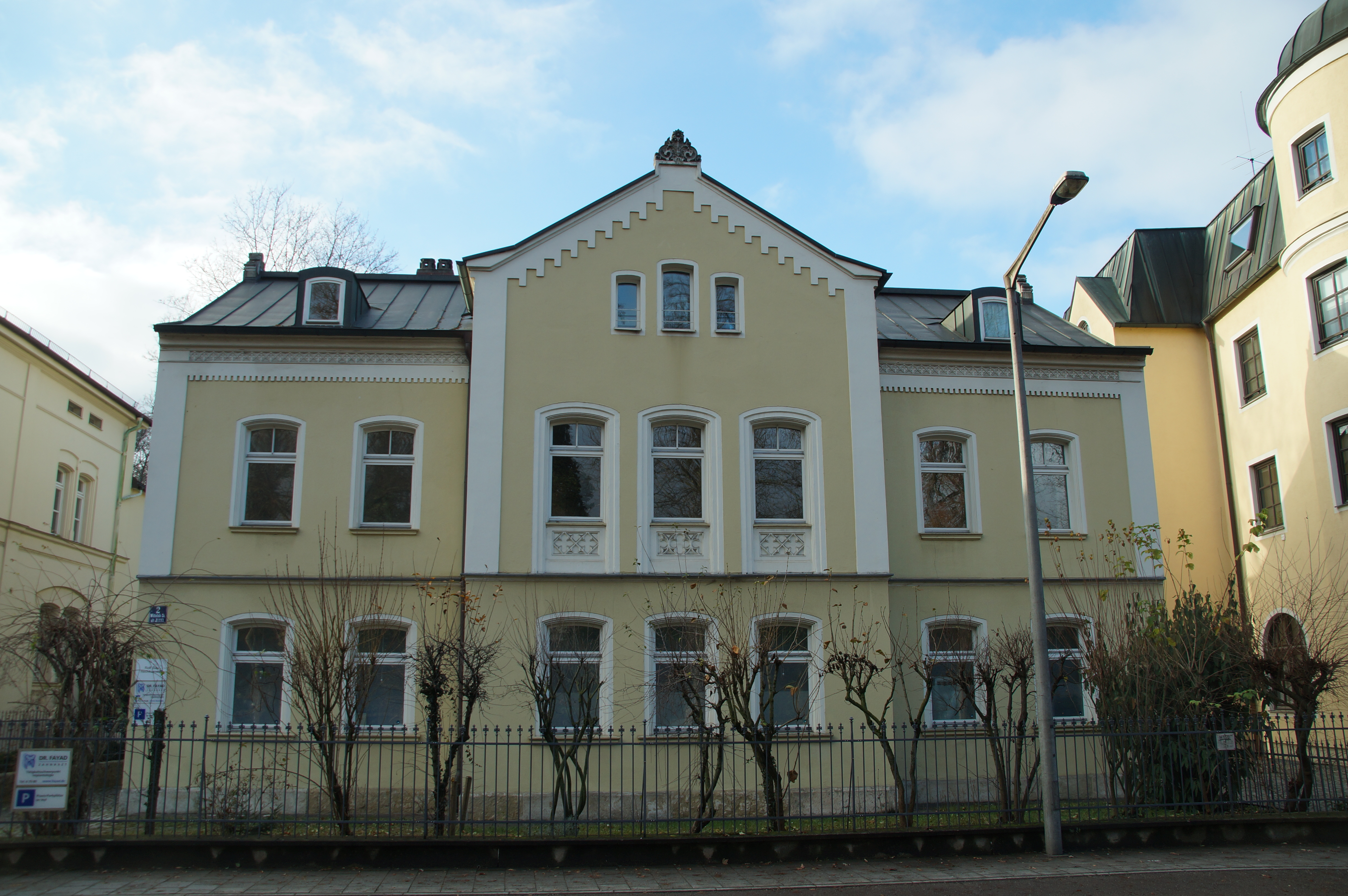 Villa, zweigeschossiger und traufständiger Satteldachbau mit Mittelrisalit und Putzgliederungen, neugotisch, um 1860; Einfriedung, Gusseisenzaun und profilierte Pfeiler This is a photograph of an architectural monument.